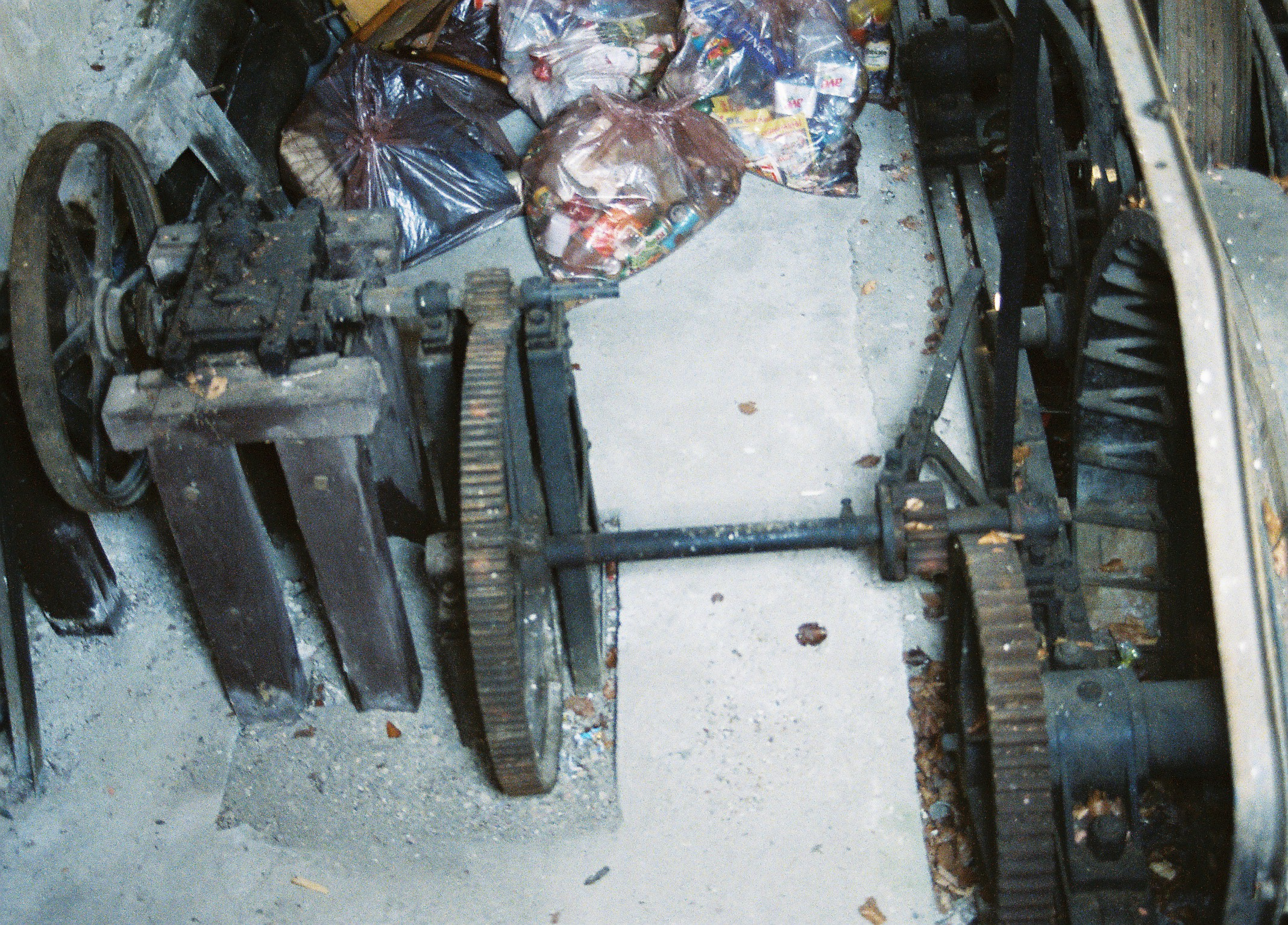 Bremsvorgelege, Schiefe Ebene Bergstation Szalajkabahn